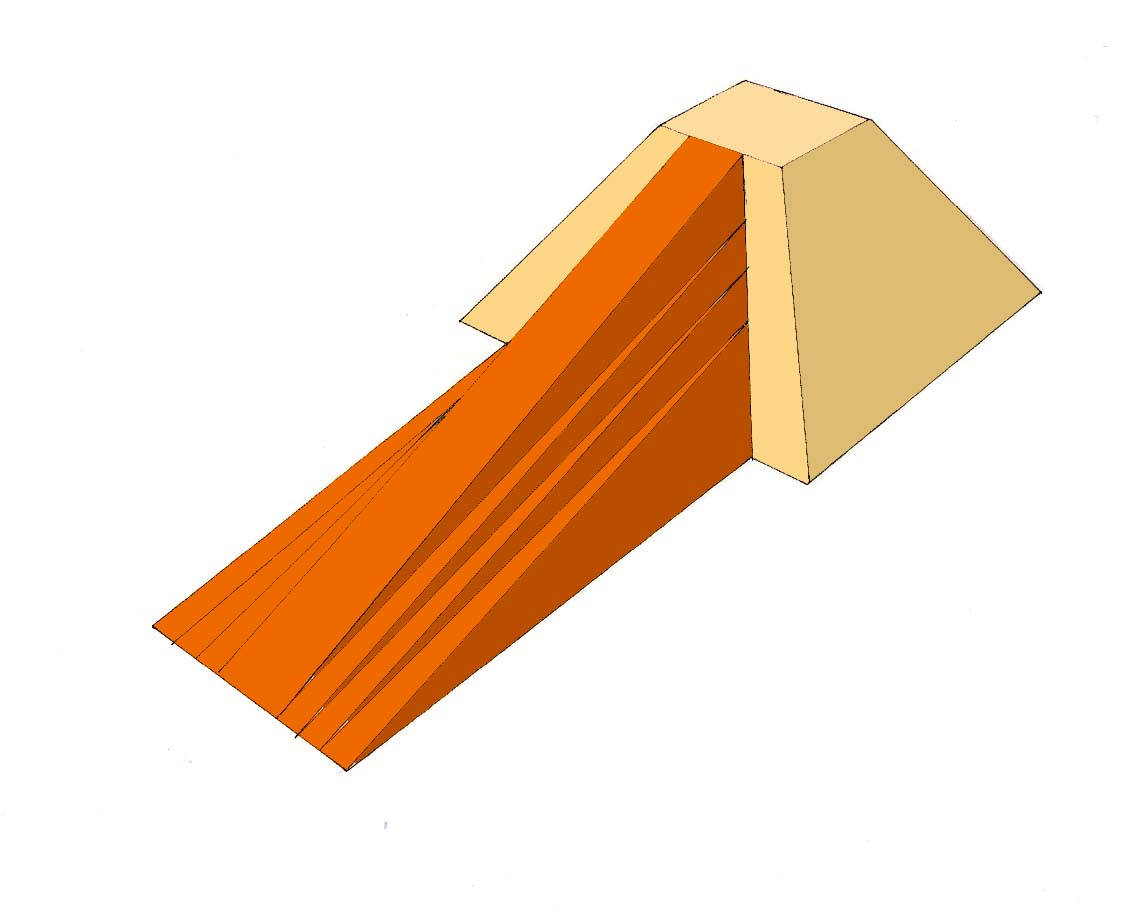 Rampe frontale préconisée par Jean-Philippe Lauer pour l'édification d'une pyramide